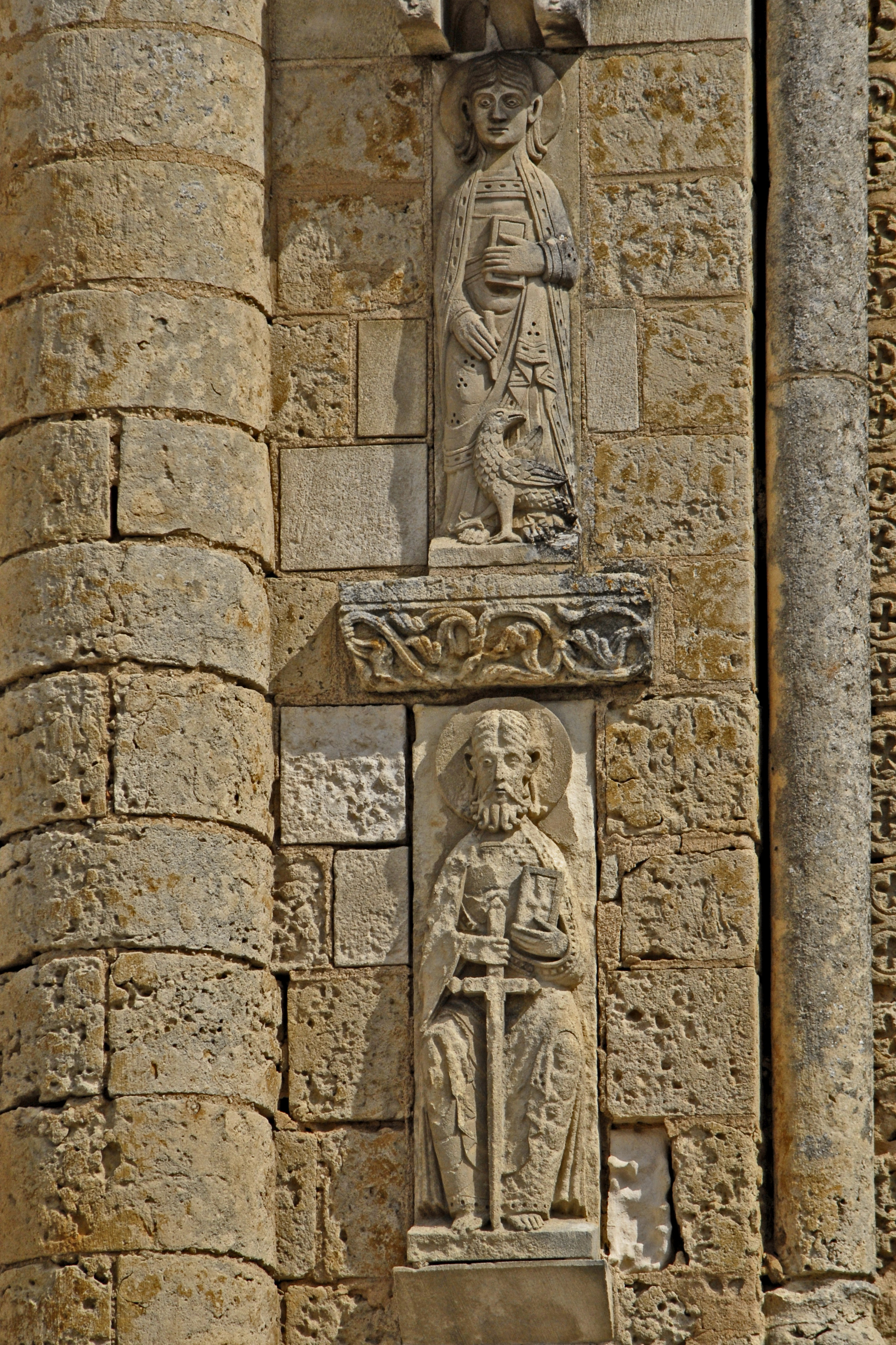 Saint-Jouin-de-Marnes, Die Heiligen Jovinus und Johannes flankieren das Mittelfenster